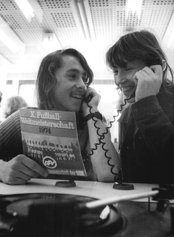 ADN-ZB-Reiche-13.6.74-Berlin: Die Amiga-Platte zur Fußball-Weltmeisterschaft mit zwei Titeln von Frank Schöbel findet in den Schallplattengeschäften, wie hier im Haus der Elektroindustrie am Alexanderplatz, großen Anklang. Auf der Plattentasche ist die Fußballnationalmannschaft der DDR abgebildet.